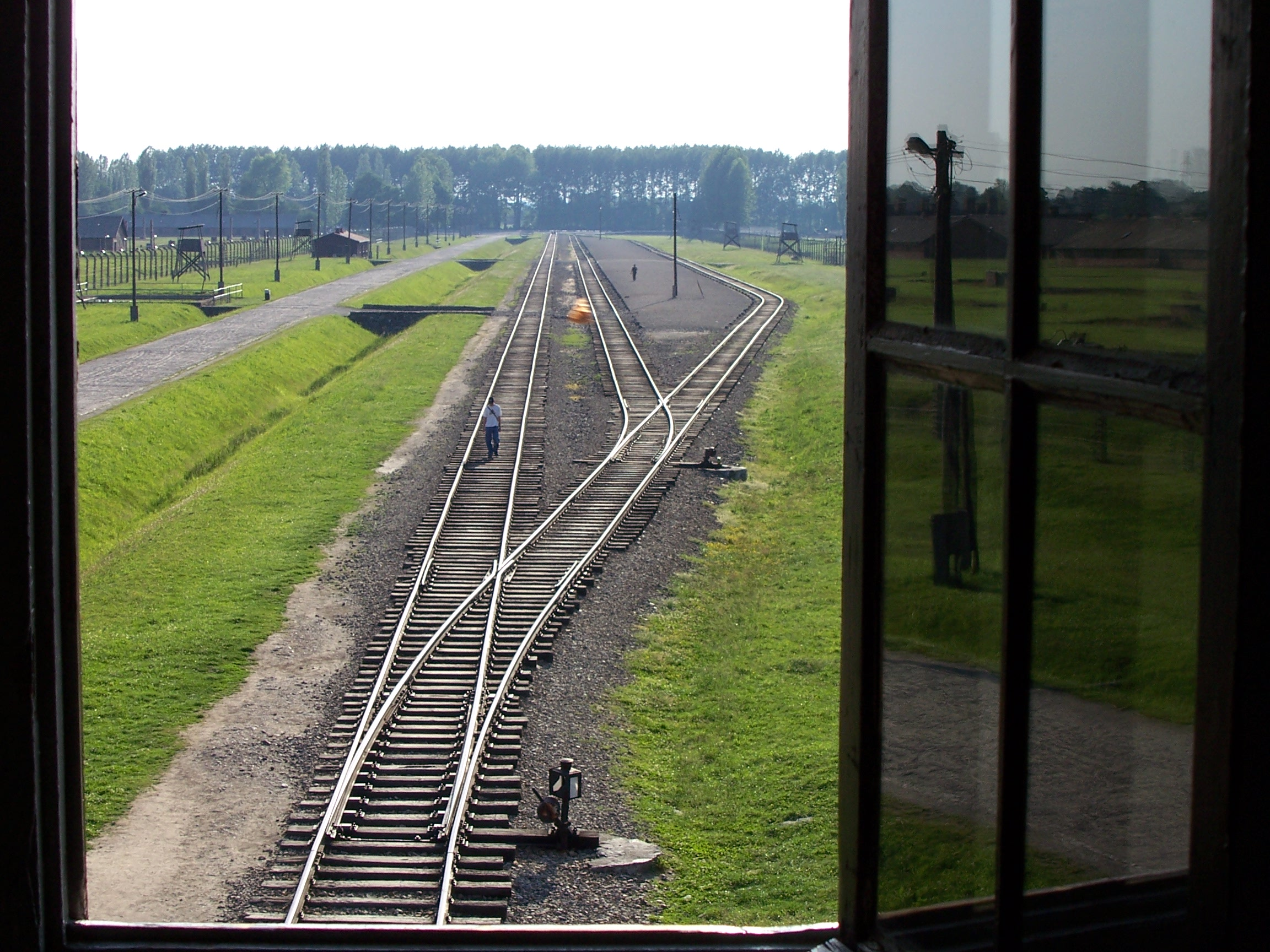 Auschwitz II - Birkenau. View from watching tower. Author: Piotr Daczyński - daczor